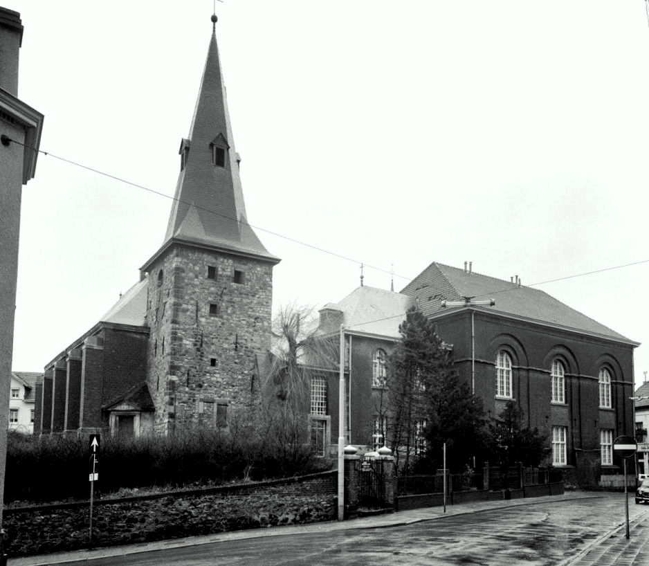 Voormalige Rooms-Katholieke Kerk: met Nederlands Hervormde Kerk en omgeving